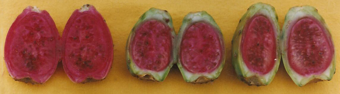 Fruto de tuna morada País: Perú Fotógrafo:© Edgar Amador Espinoza Montesinos